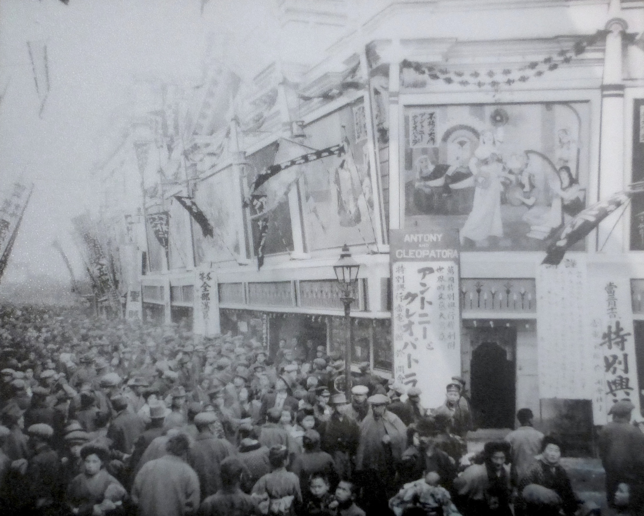 「アントニーとクレオパトラ」上映時の電気館 (Teikokukan)